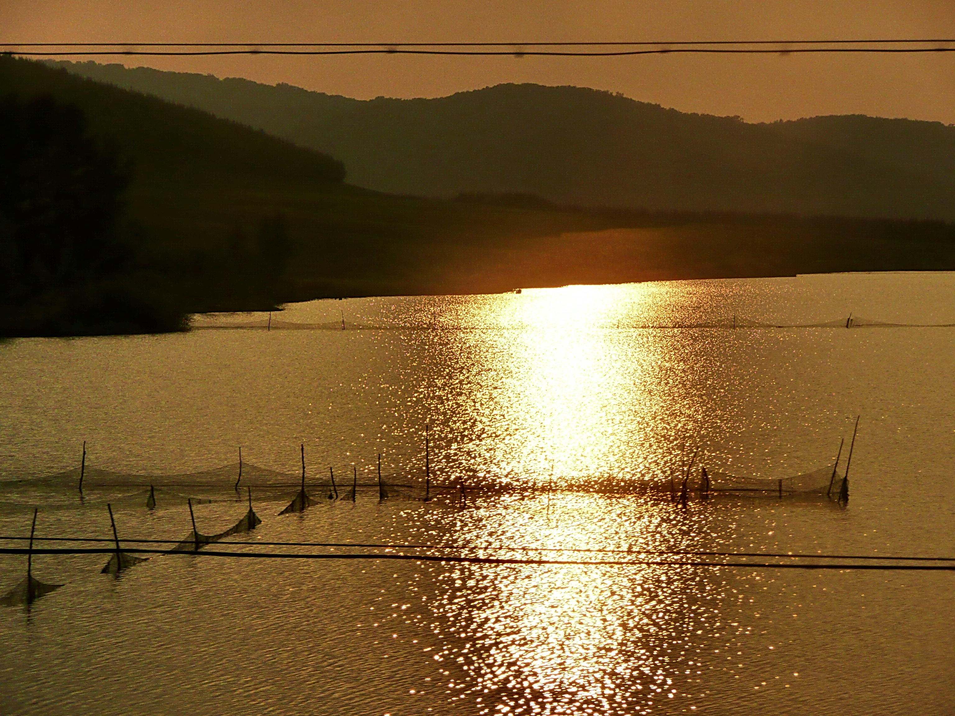 Mudan River 牡丹江